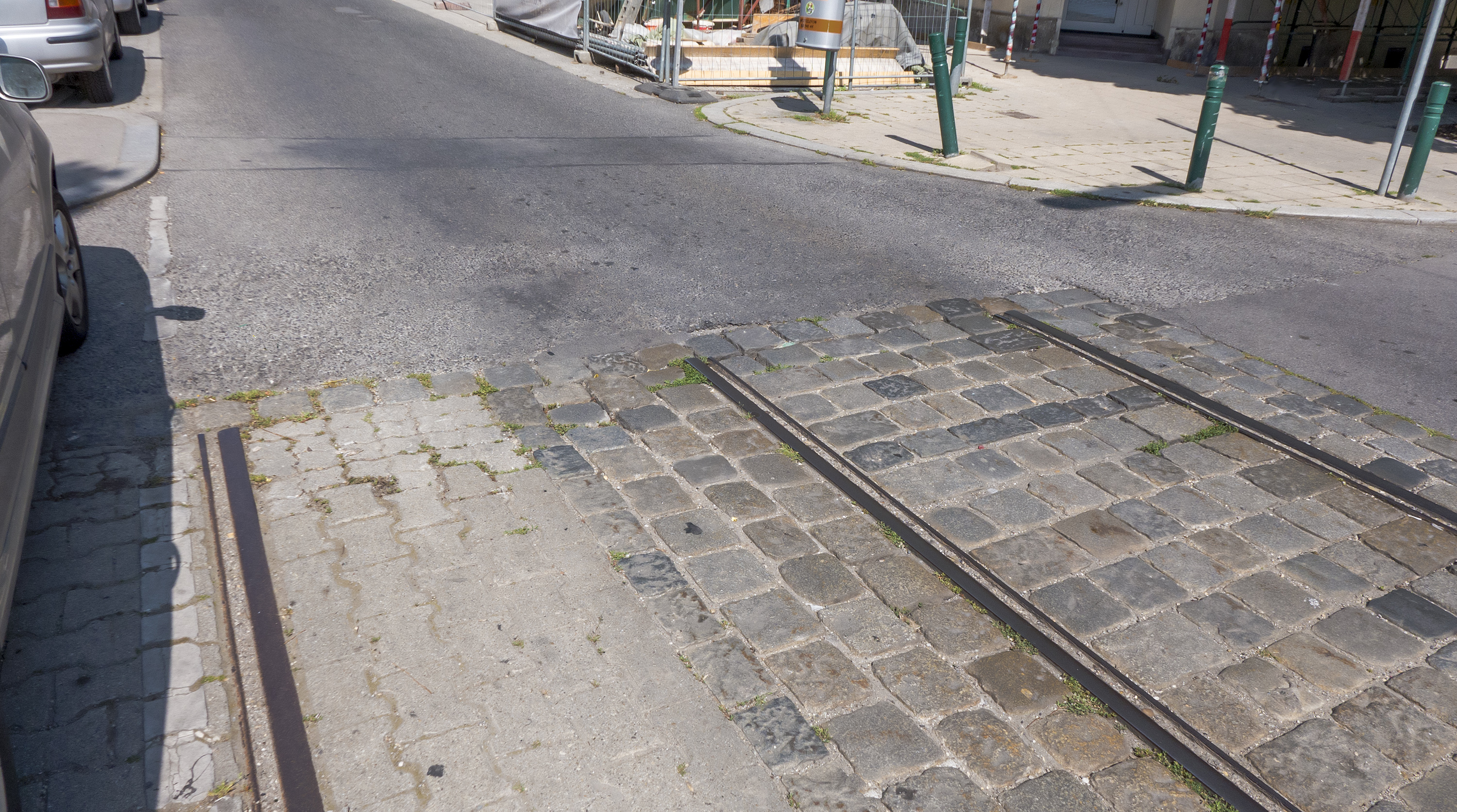 Verwahrloster Straßenbelag in Wien 10 Antonsplatz Richtung Westen